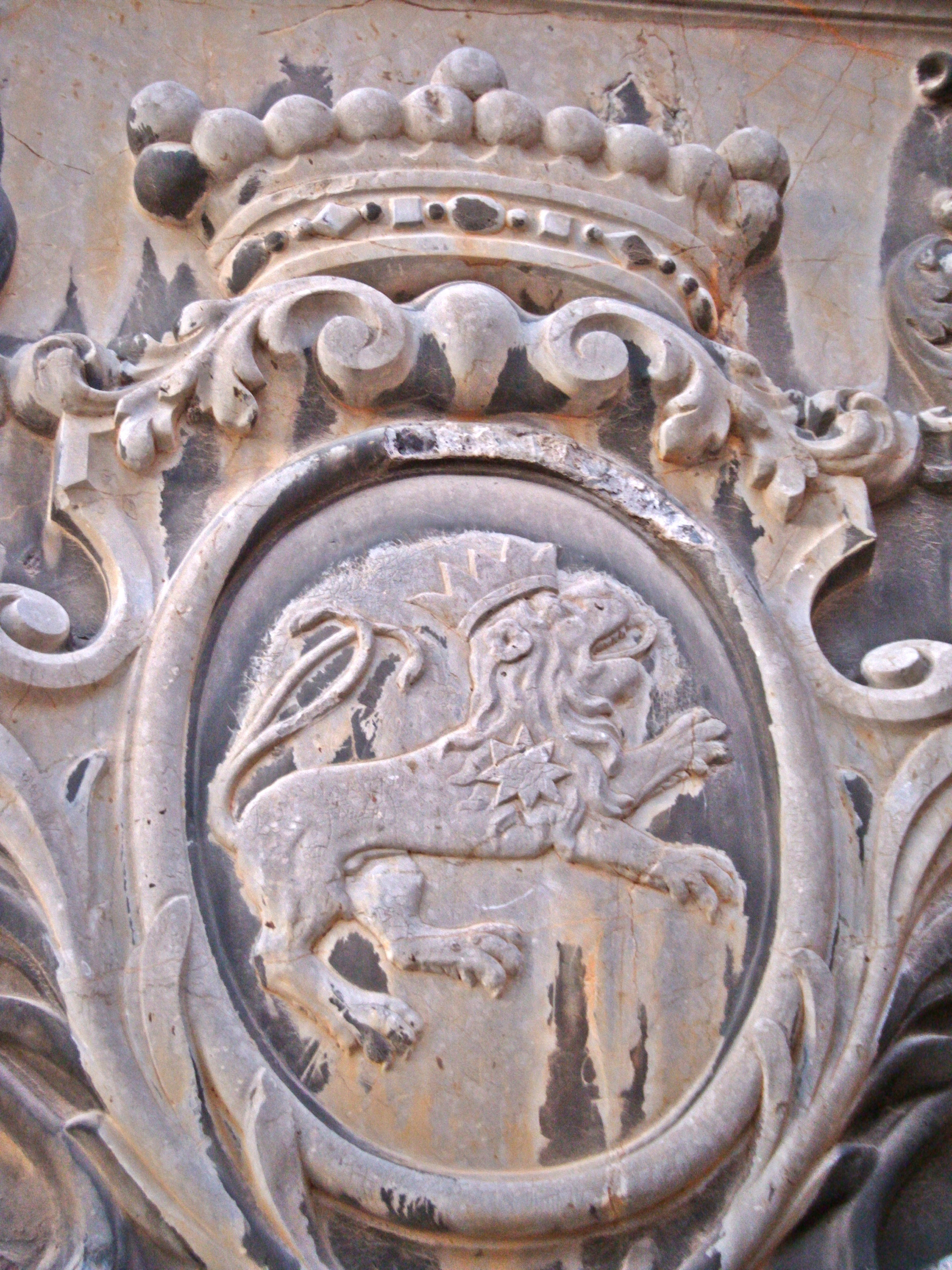 Wappen der Freiherrn von Auwach, am Epitaph des Domherrn Hermann Lothar von Auwach (+ 1722), südliche Außenseite des Speyerer Domes